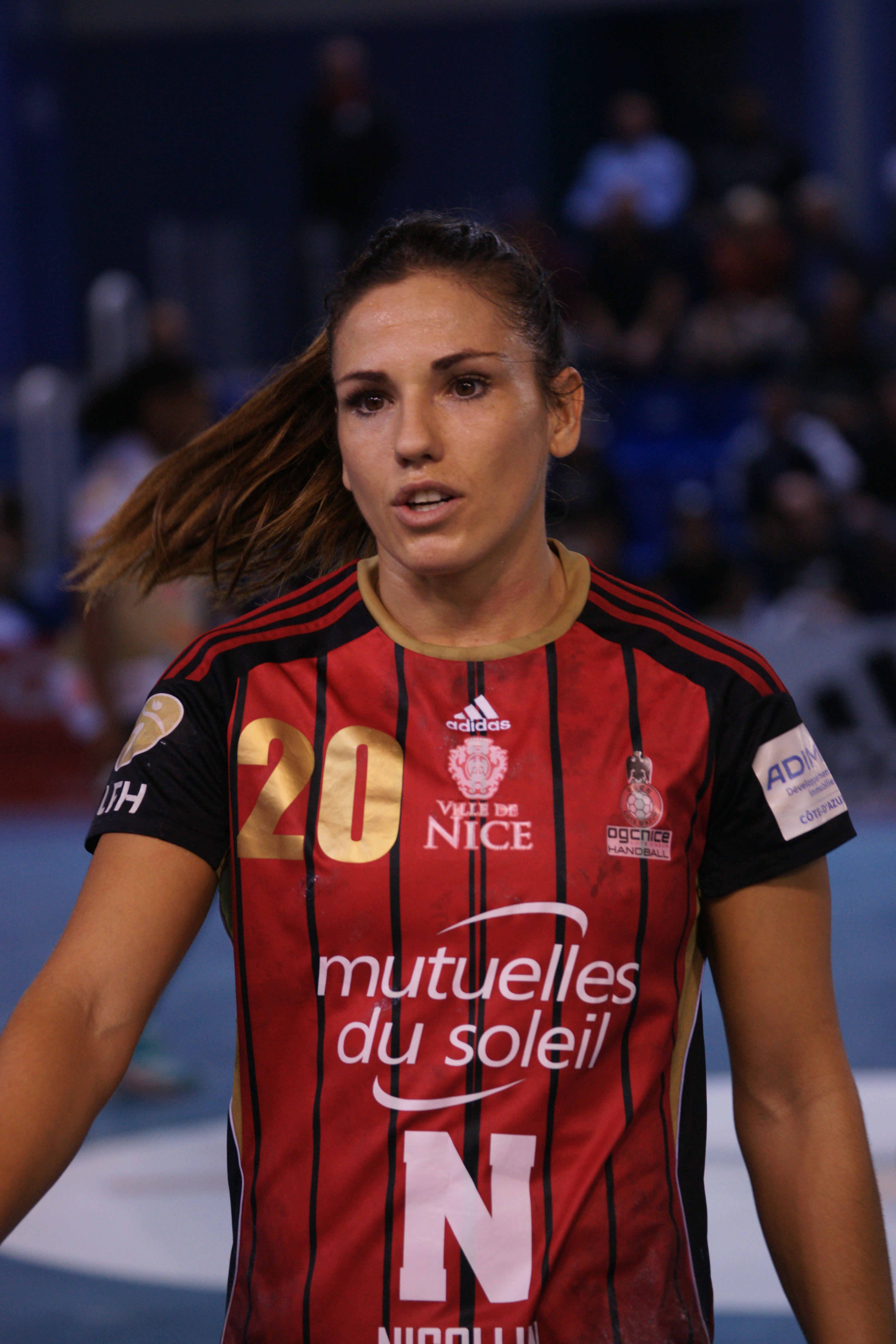 Carmen Martin, OGC Nice-Chambray 2017